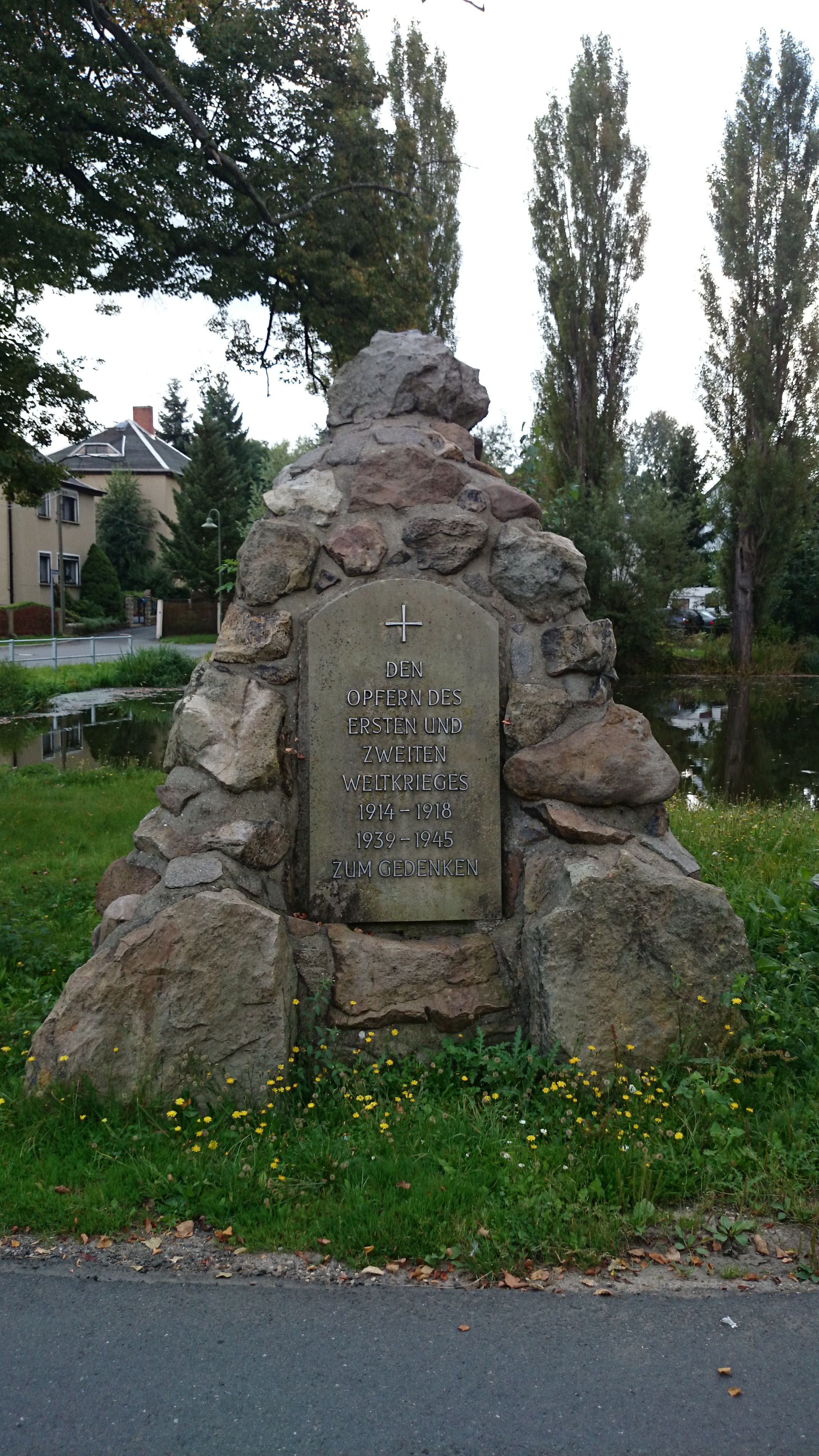 Gefallenendenkmal in Rippicha